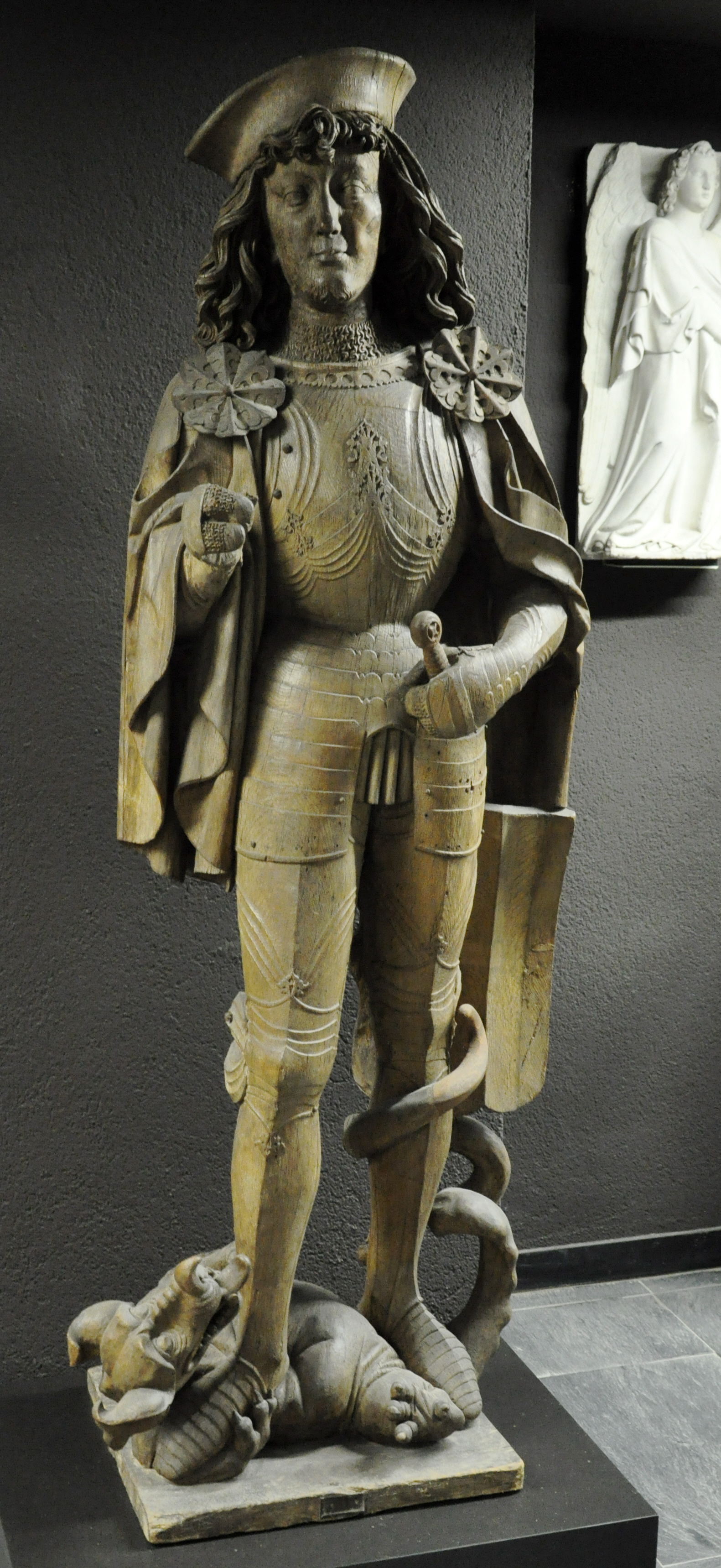 Heiliger Georg, Ulm 1496-1499, Eichenholz Liebieghaus, Frankfurt am Main, Inv. Nr. 73 (ausgestellt im Schaudepot) Laut Beschriftung im Liebieghaus aus Ochsenhausen, nach anderen Angaben aus der Georgskapelle in Ravensburg, später Sammlung Theodor Schnell d. J., 1906 an das Liebieghaus verkauft